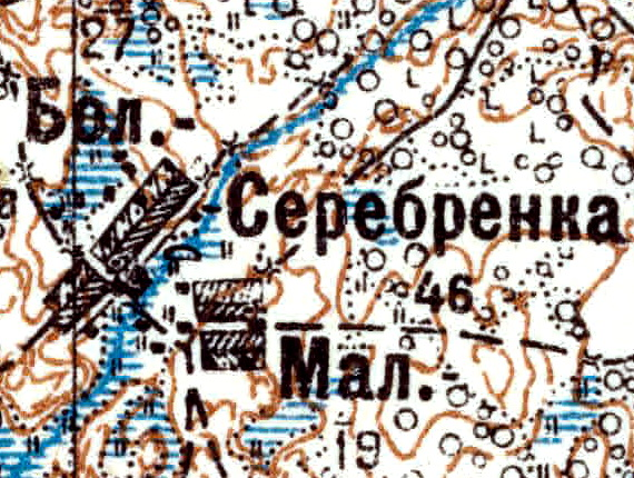 Топографическая карта Ленинградской области, квадрат VIc-26 (Ставотино), деревня Серебрянка